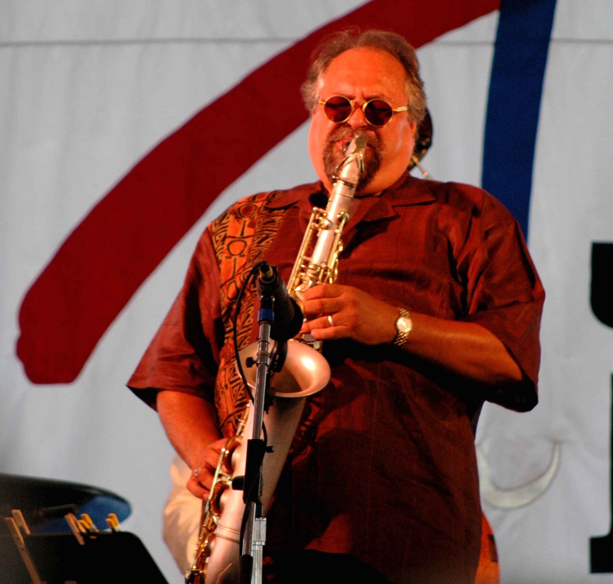 Joe Lovano, Newport Jazz Festival, 7/14/05